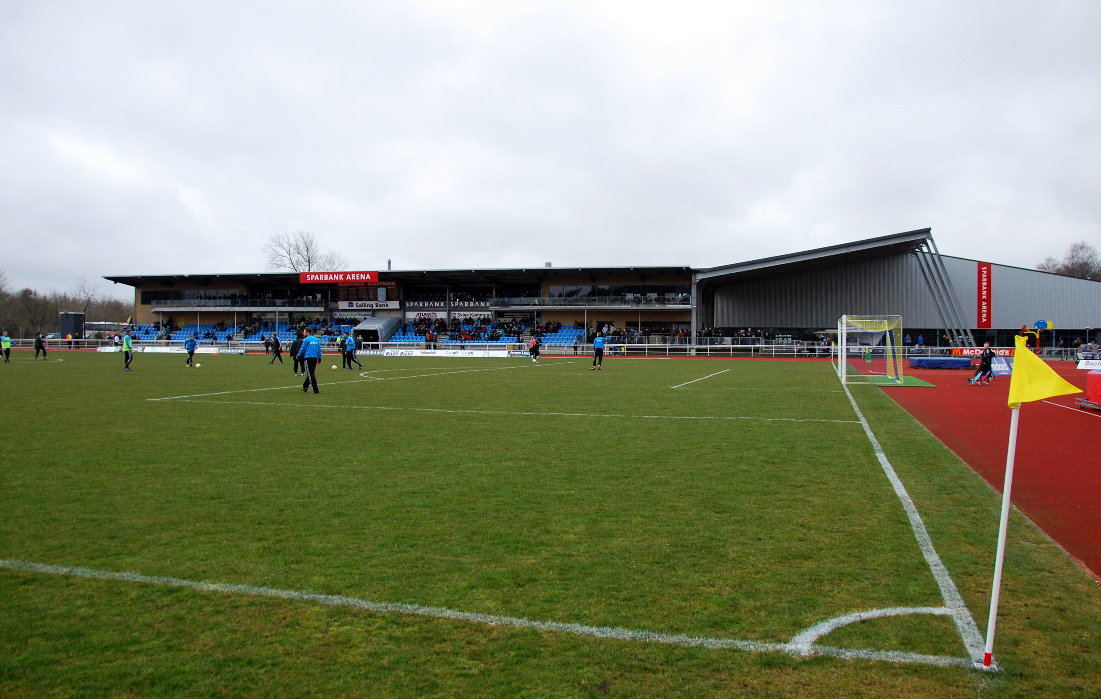 Skive Stadion (Sparbank Arena) er hjemmebane for Skive IK. Her ved en 1. divisionskamp imellem Skive og Blokhus FC. Bygningen til højre er atletikhallen.